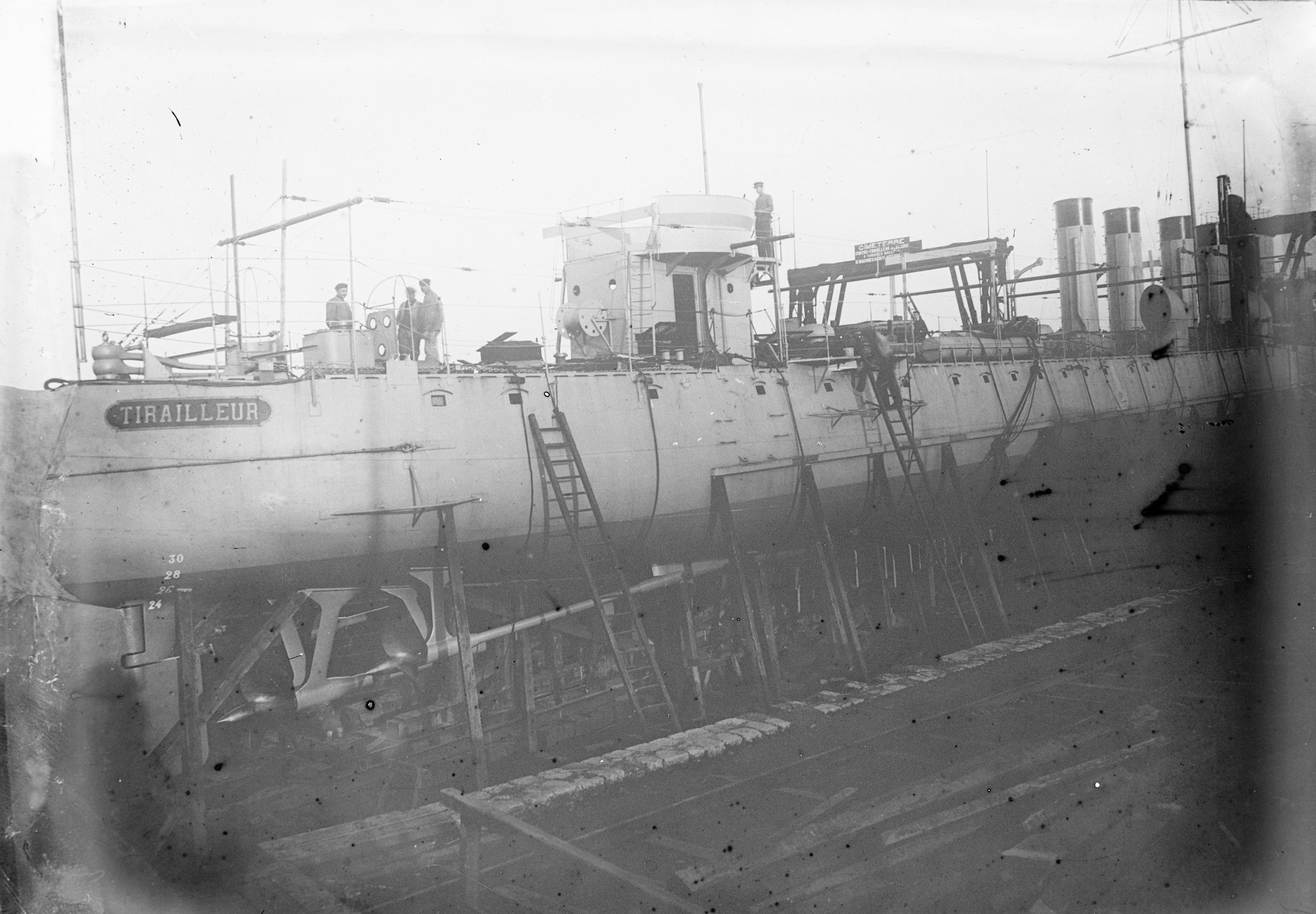 Le Tirailleur contre-torpilleur : [photographie de presse] / [Agence Rol] Notice